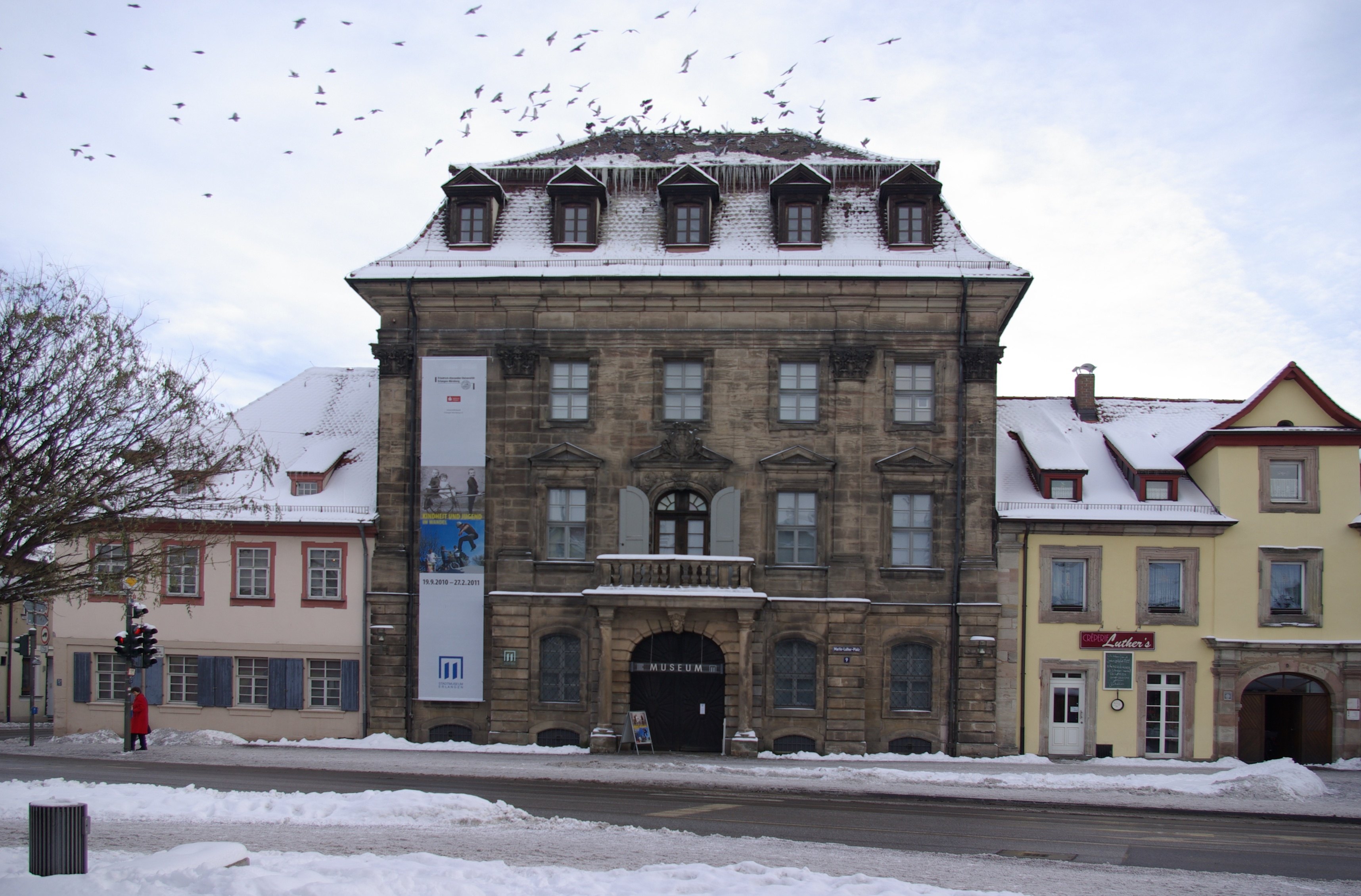 Stadtmuseum Erlangen im ehemaligen Rathaus der Altstadt